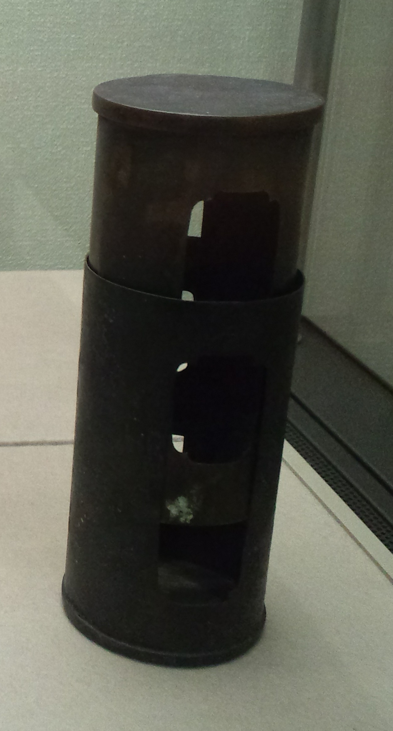 茨木市立キリシタン遺物史料館 キリスト磔刑木像の筒（周囲6.8cm、高さ13.3cm、東 藤嗣氏寄託）